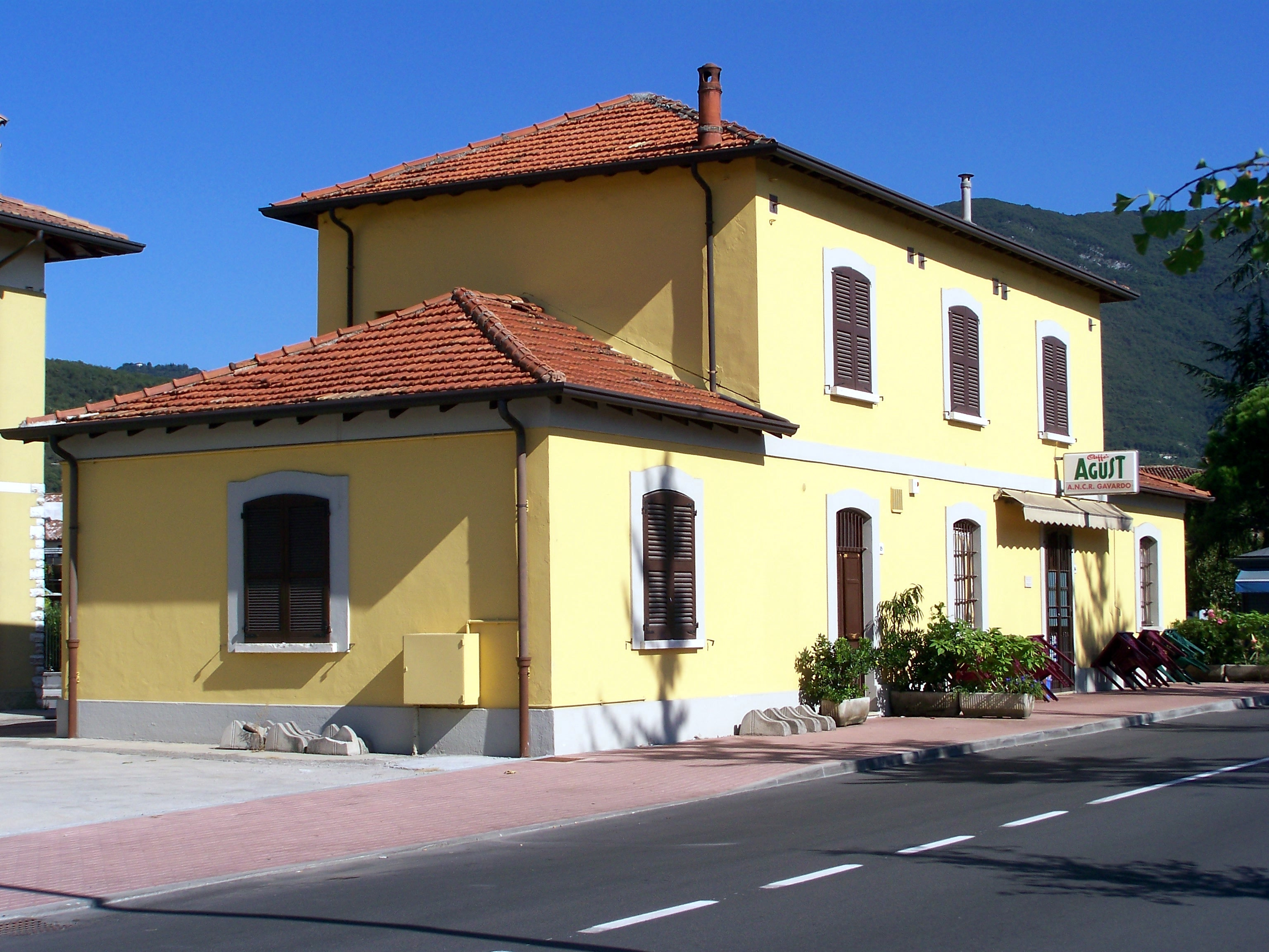 Lato ferrovia e lato Rezzato del Fabbricato Viaggiatori della stazione di Gavardo della Rezzato-Vobarno.